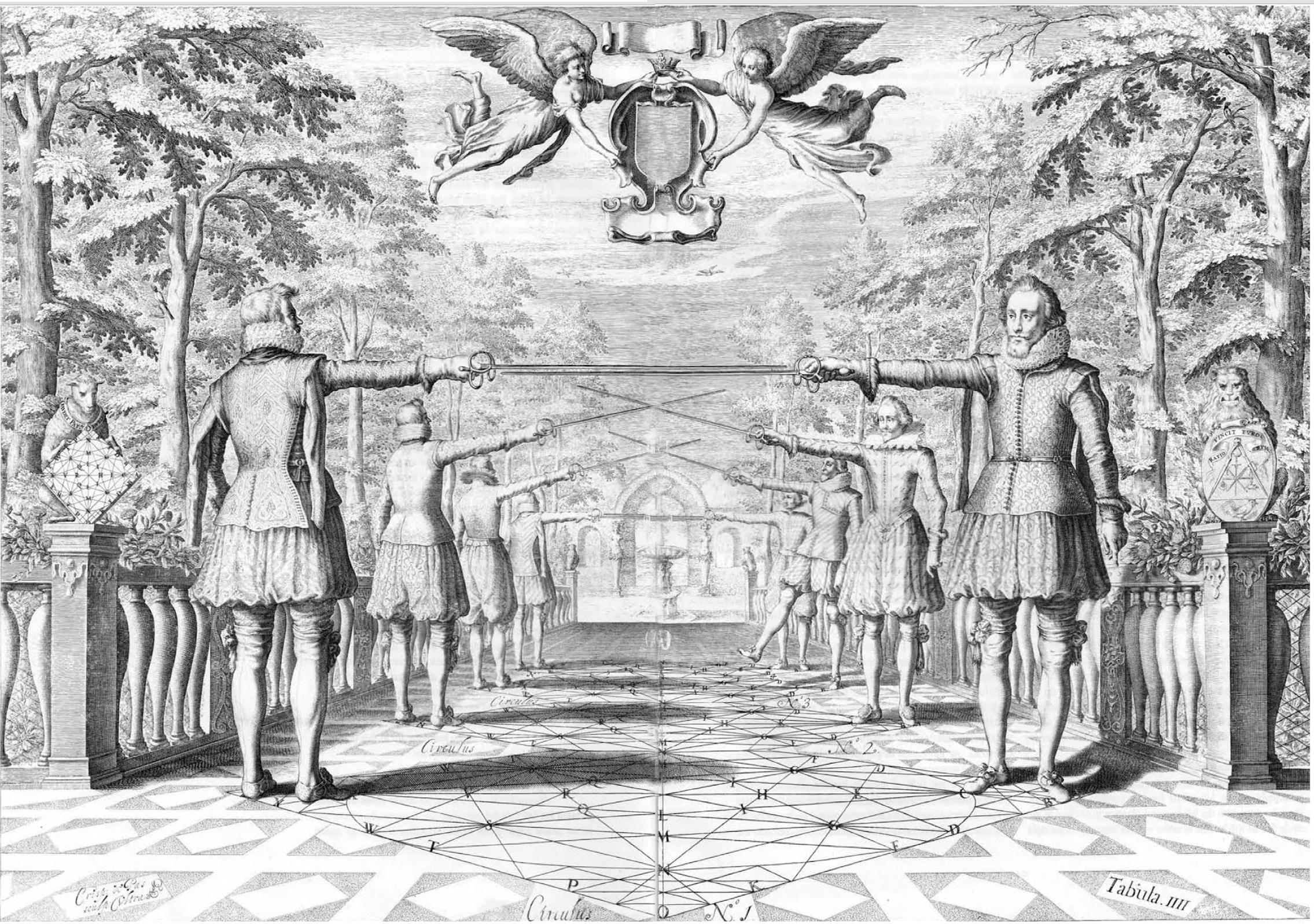 Позиции по прямой линии. Иллюстрация из трактата Жерара Тибо "Академия меча"